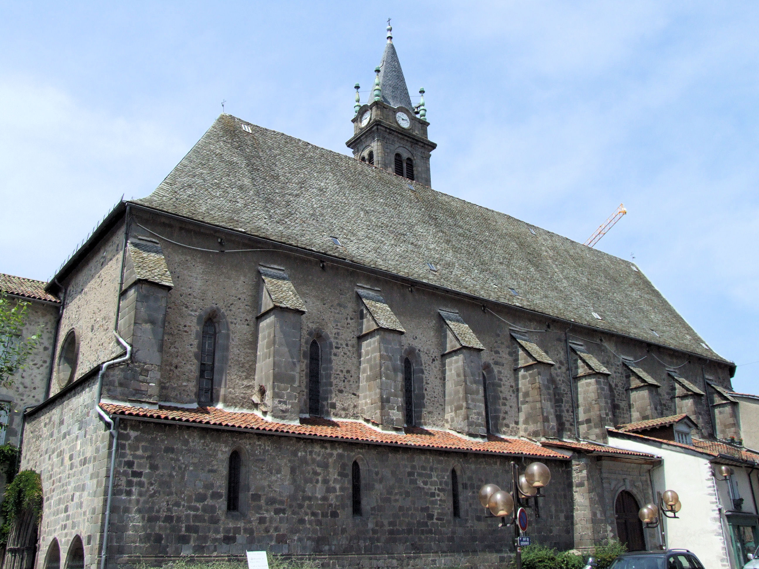 Aurillac - Eglise Notre-Dame-aux-Neiges